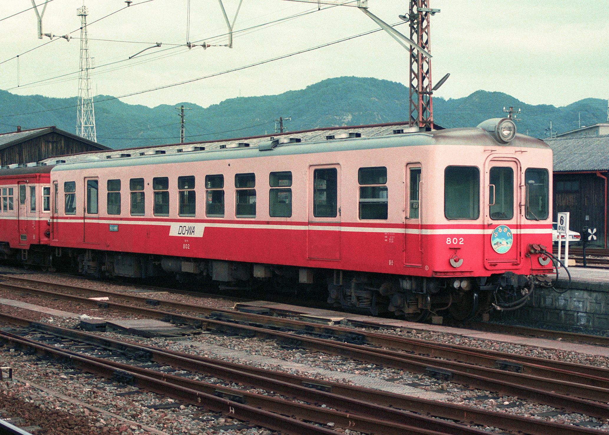 同和鉱業片上鉄道キハ802